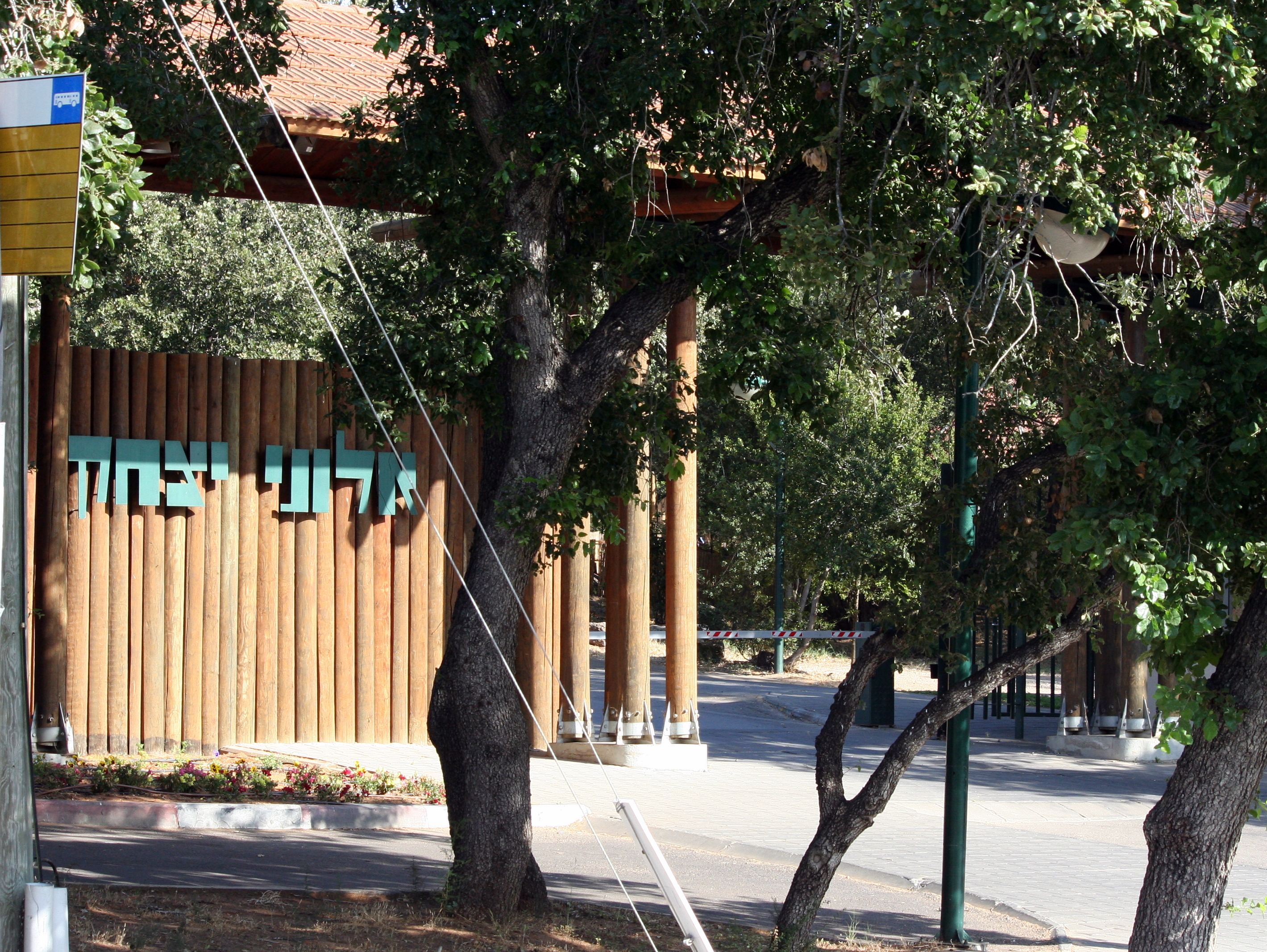 הכניסה לכפר הנוער אלוני יצחק